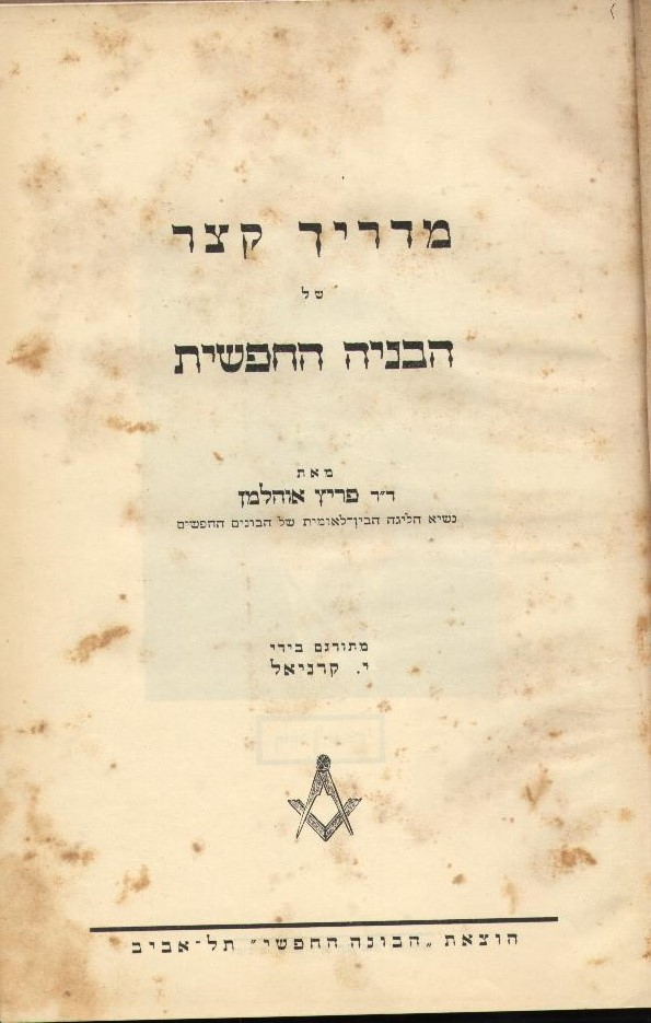 דף שער המדריך של אוהלמן לבונה החפשי